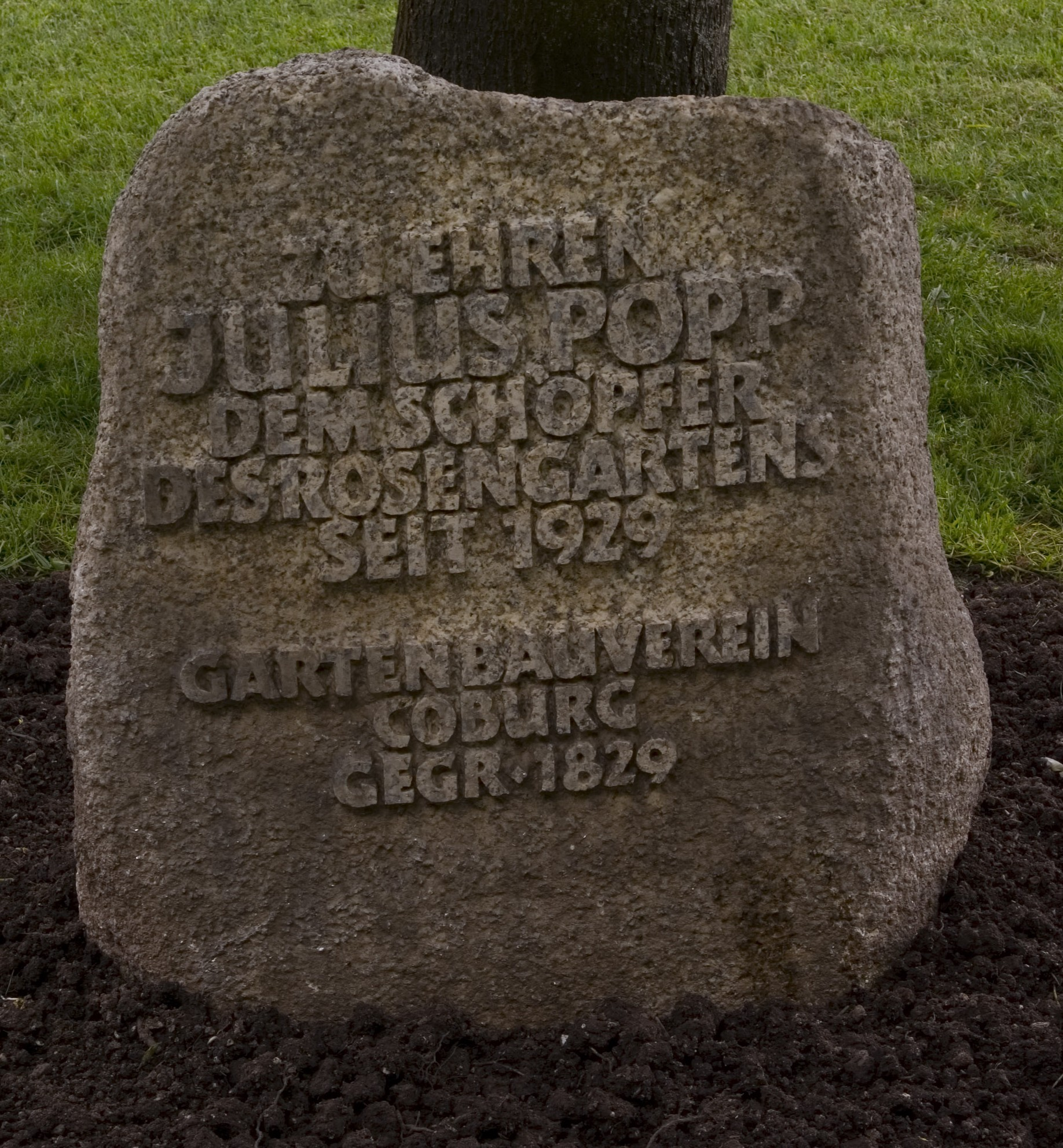 Gedenkstein für Julius Popp im Rosengarten Coburg